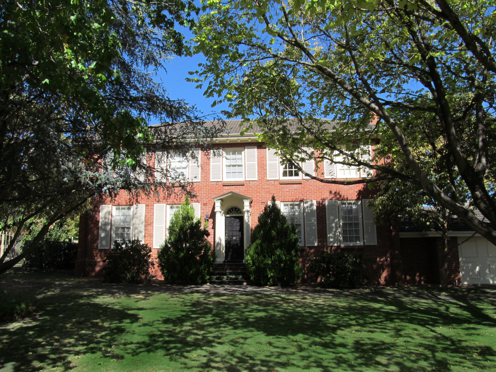 Houses in Linden Park, Adelaide.